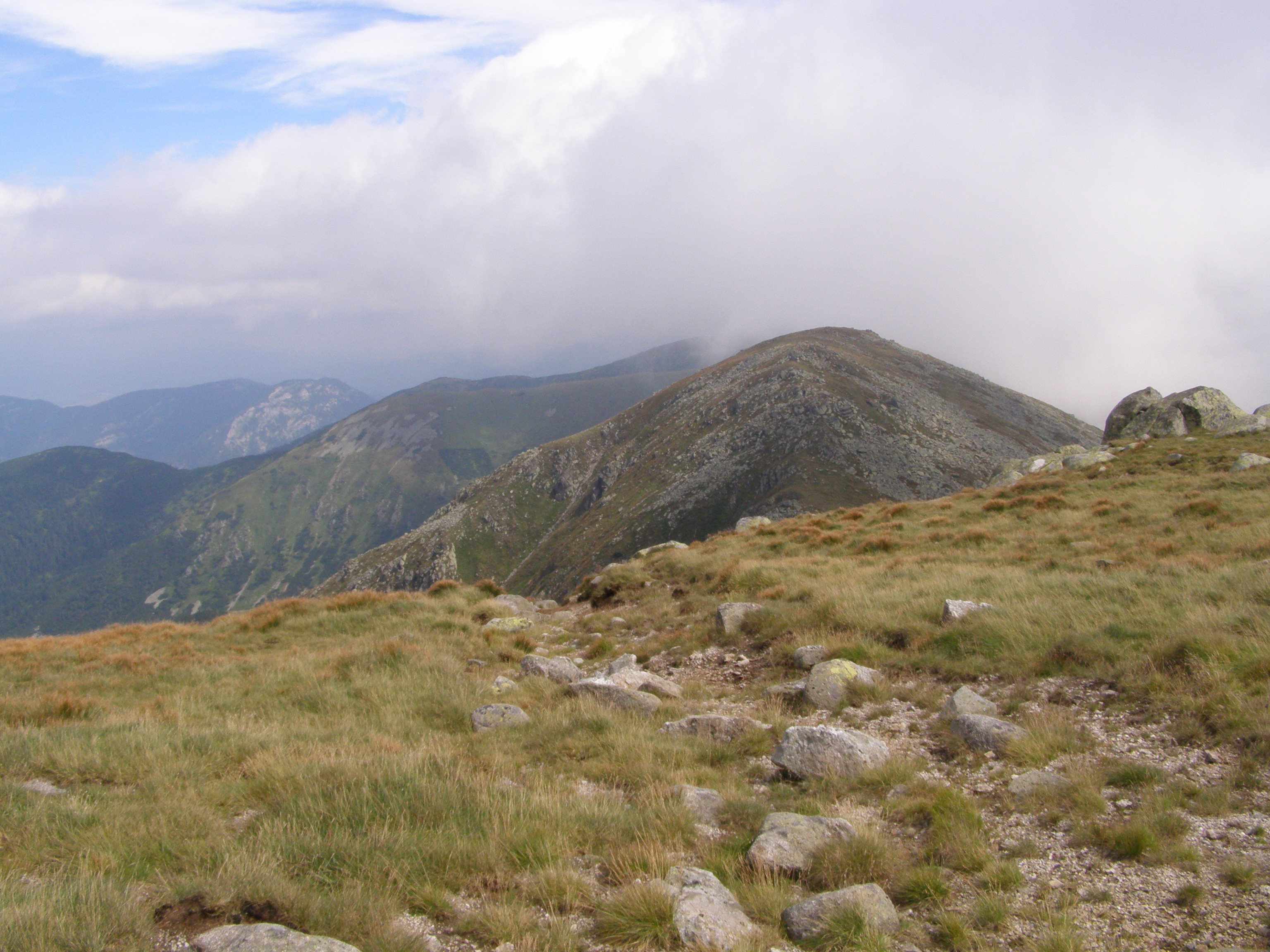 Nízké Tatry, Ďumbierské Tatry, pohled z vrcholu Chopok (2024 m) na západ: v popředí vrchol Konské (1875), v pozadí v mlze masiv Ďumbieru